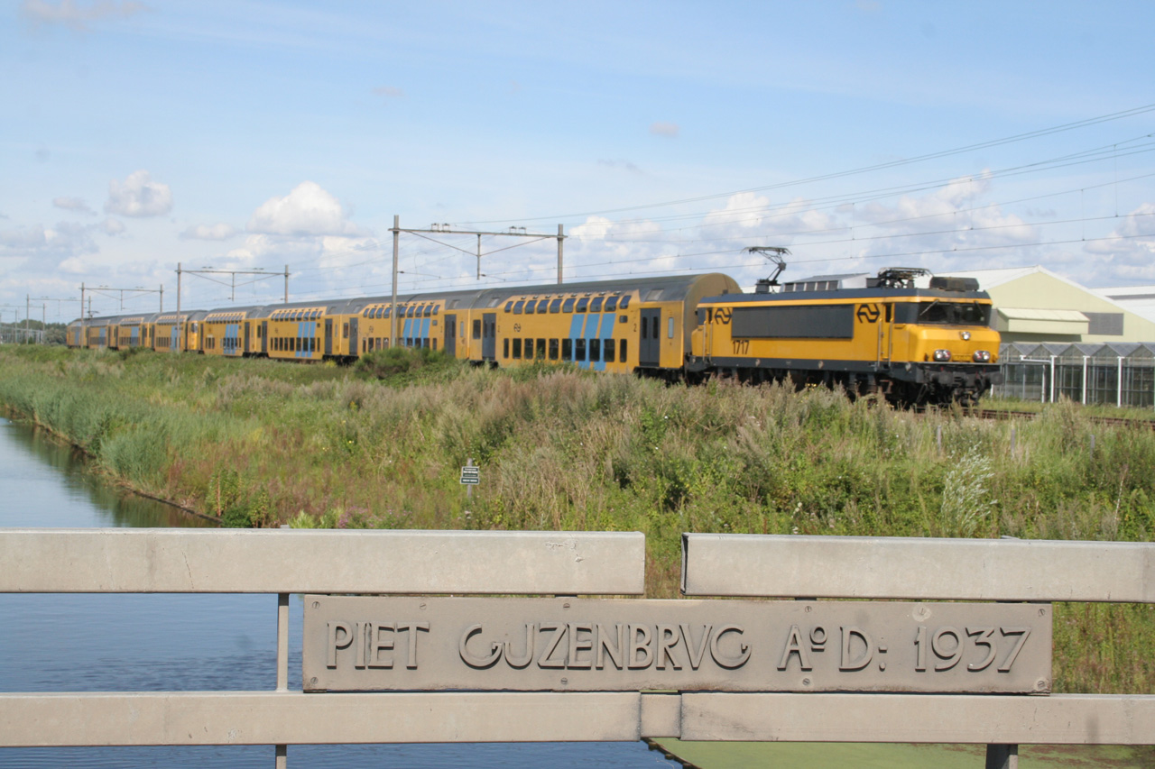 Foto bij Piet Gijzenbrug